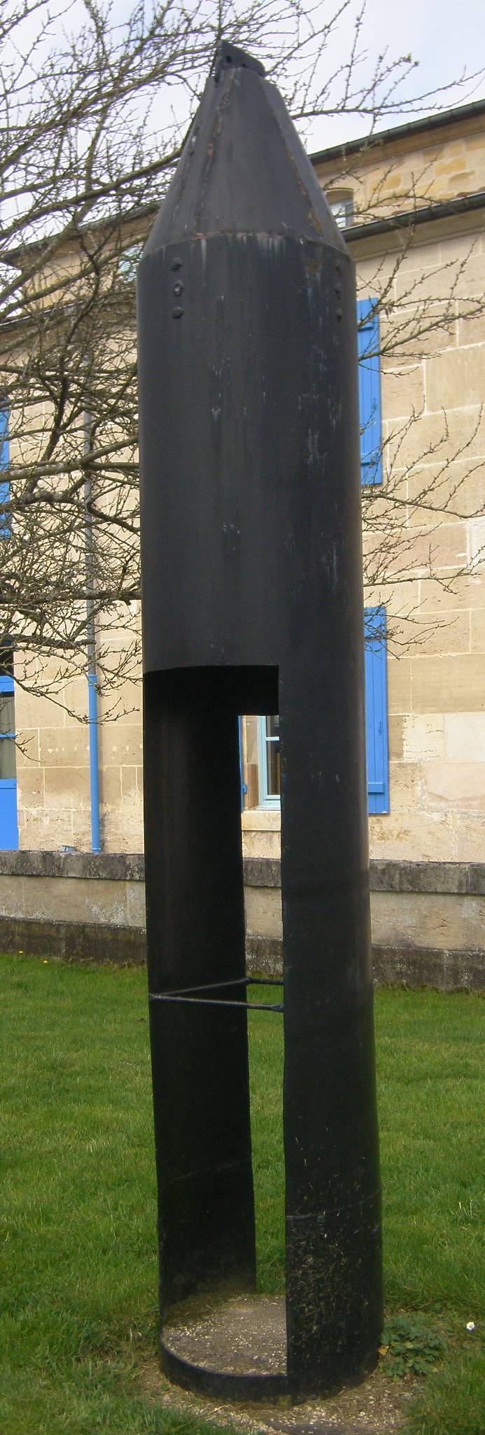 Nacelle qui permit les premières descentes dans le puits artificiel du réseau du Rupt-du-Puits (Beurey-sur-Saulx, Meuse, Lorraine, France)